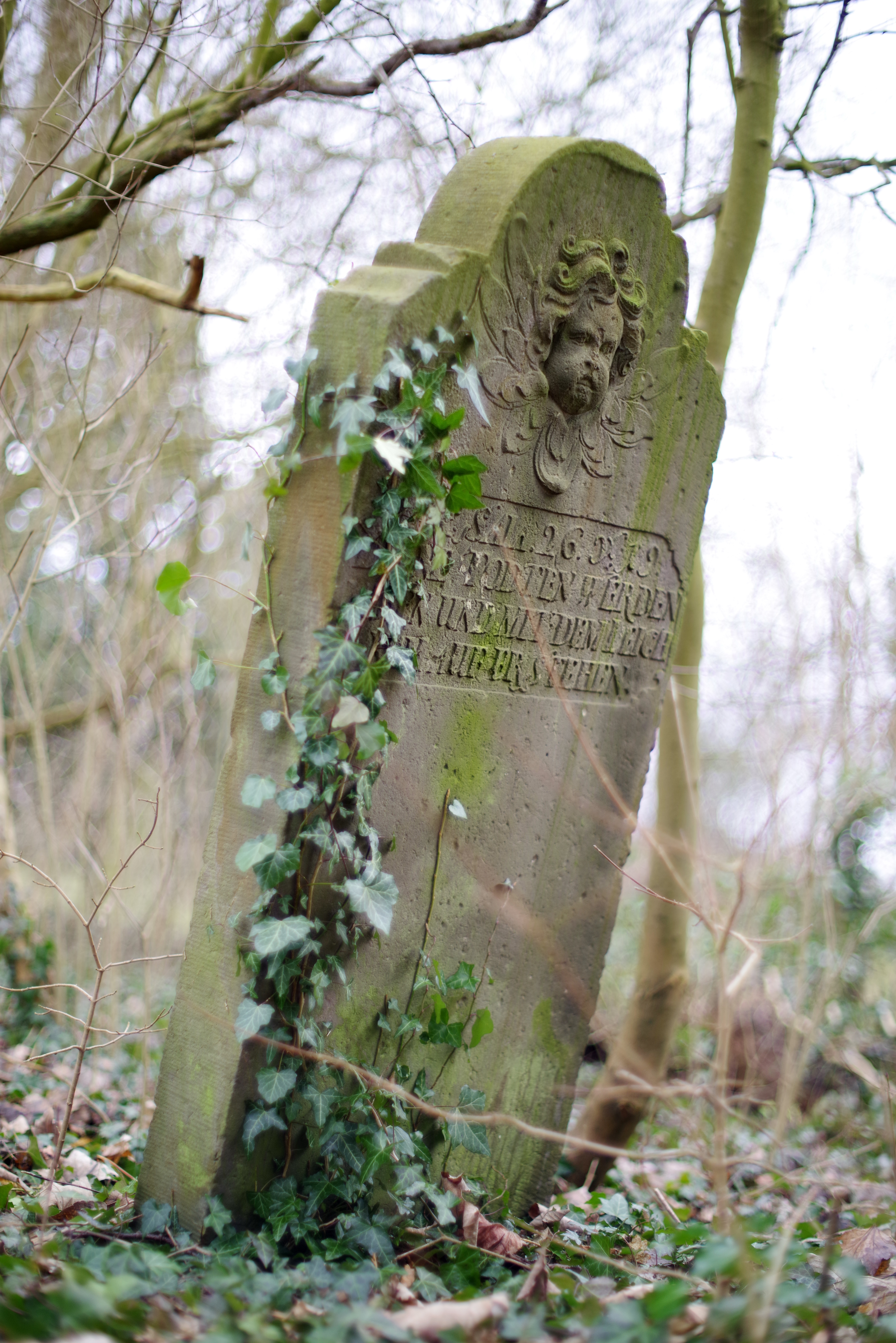 St.-Martini-Kirche (Bremen-Lesum), historischer Grabstein auf dem Kirchhof